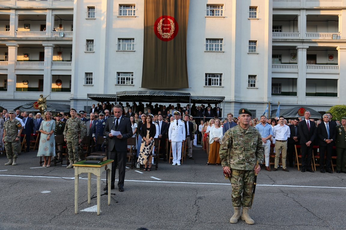 Agustín Cejas, jurando como Jefe del Estado Mayor General del Ejército Argentino